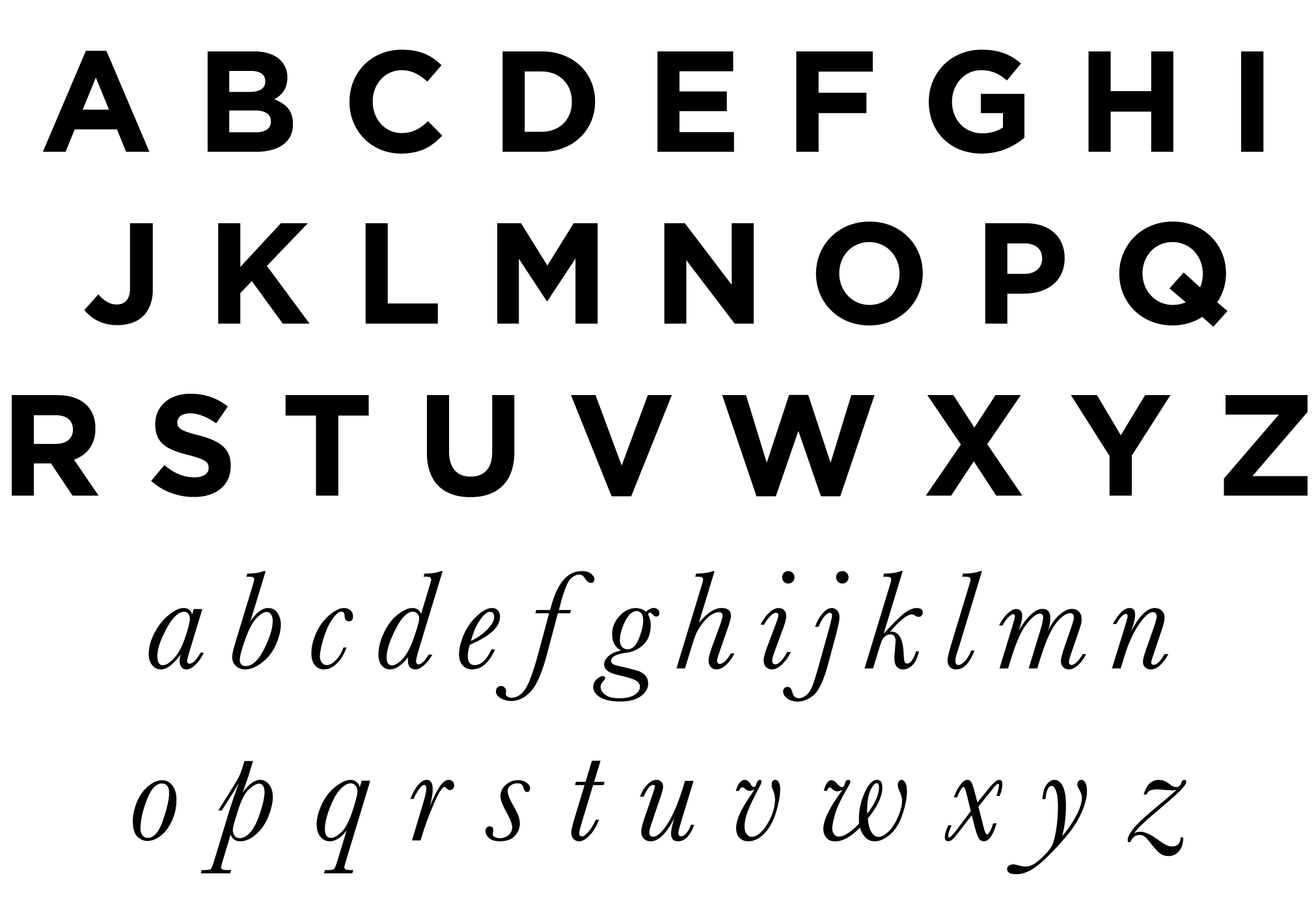 Las 26 letras del abecedario latino básico, en mayúsculas y en minúsculas cursivas. Tipos de letra: Gotham, Baskerville.